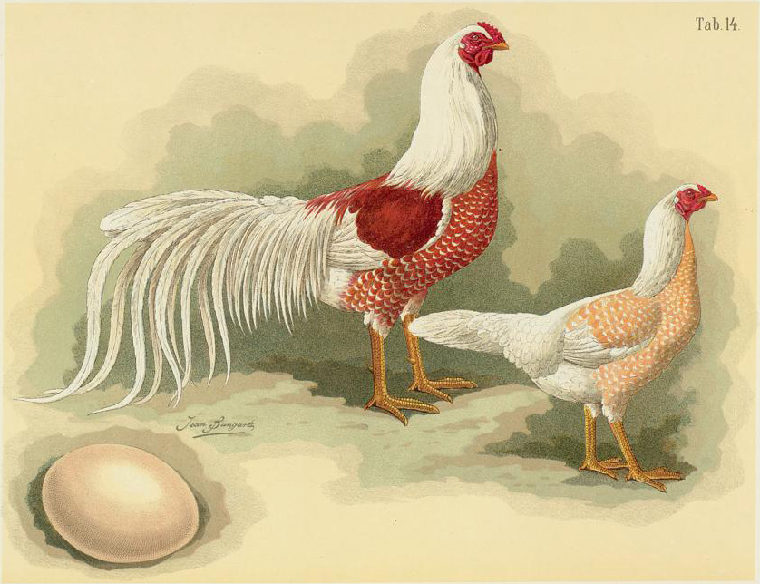 Yokohama-Huhn.Gallus dom. pugnax longicaudatus.Yokohama fowl.Race de Yokohama.